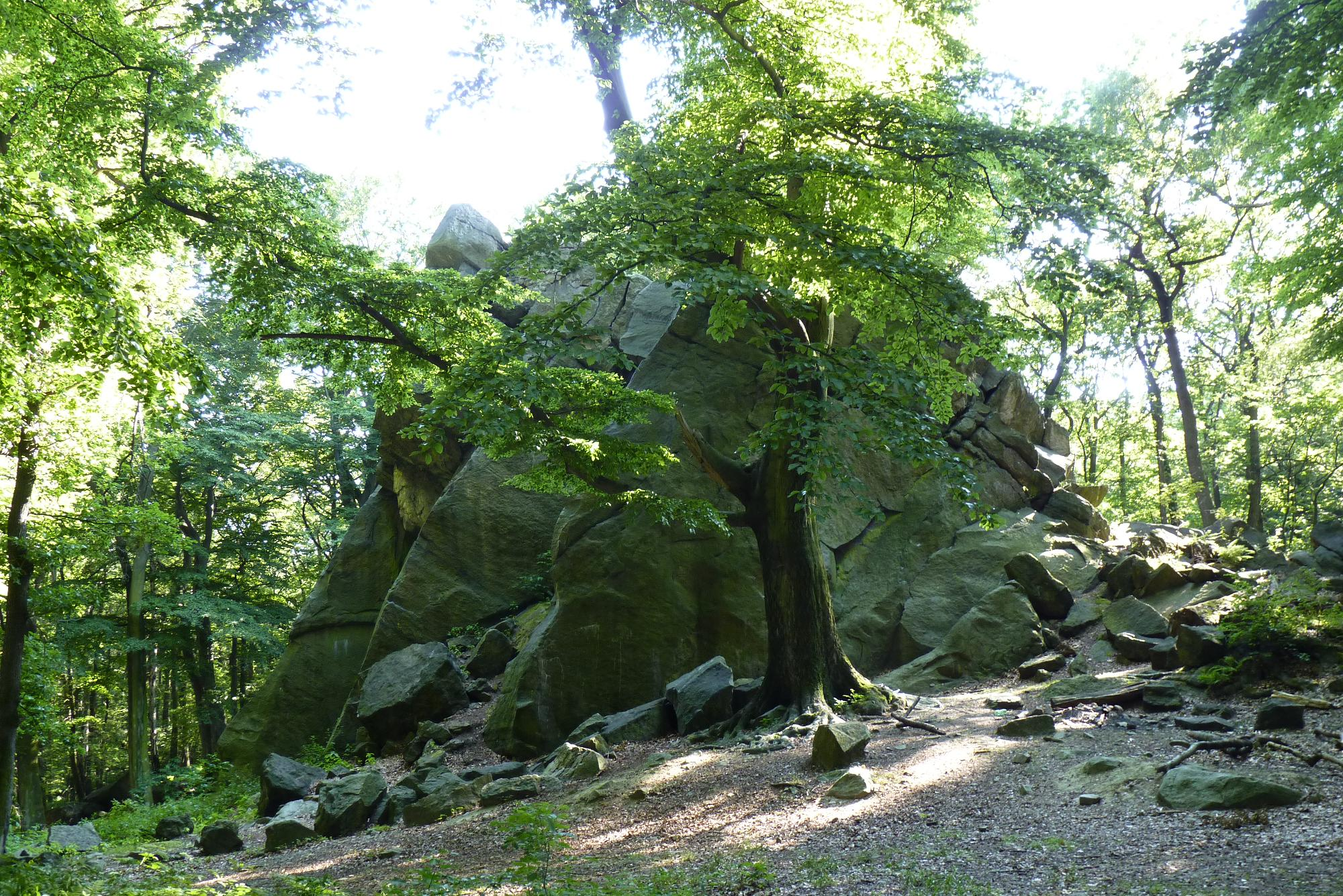 Saleiova výšina - nejvyšší bod